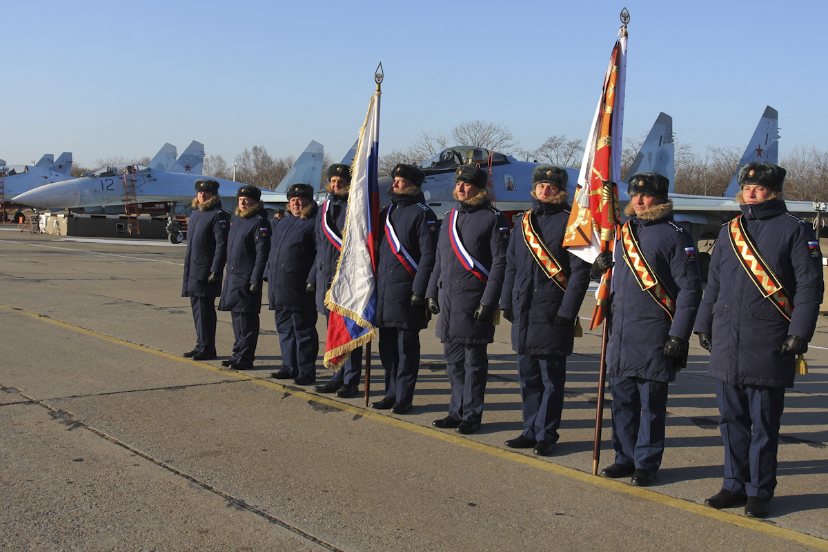 Торжественные мероприятия на аэродроме Центральная Угловая приуроченные к столетию со дня образования 22-го гвардейского истребительного авиационного Краснознамённого полка 303-й смешанной авиационной дивизии Восточного военного округа.